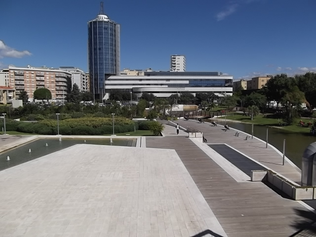 panoramica del parco della musica